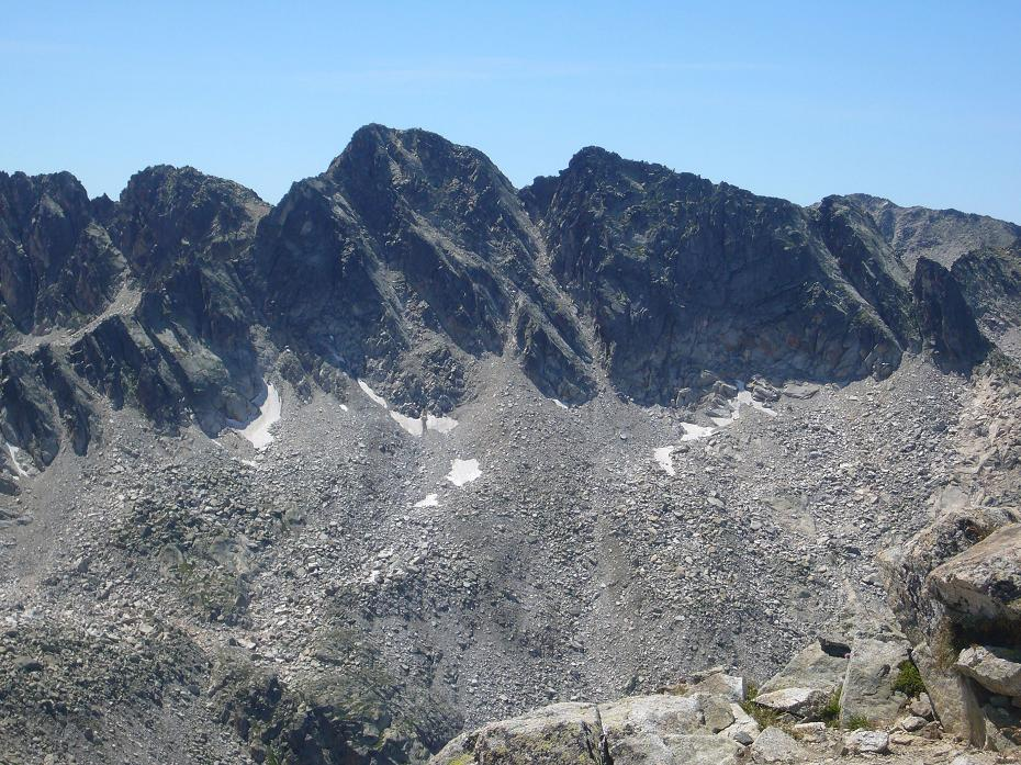 Gran Tuc de Colomèrs vist des del Pic de Ratera; Espot, Pallars Sobirà, Catalunya